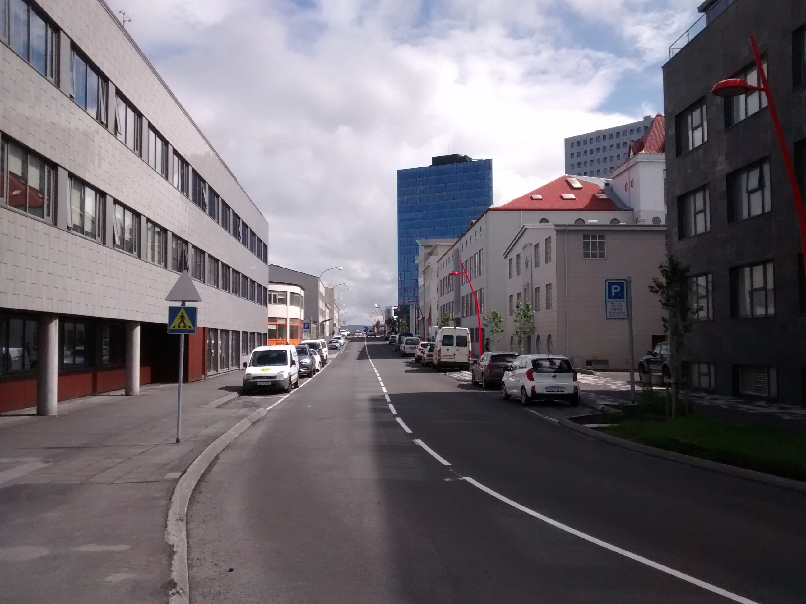 Borgartún, a street in Reykjavik.